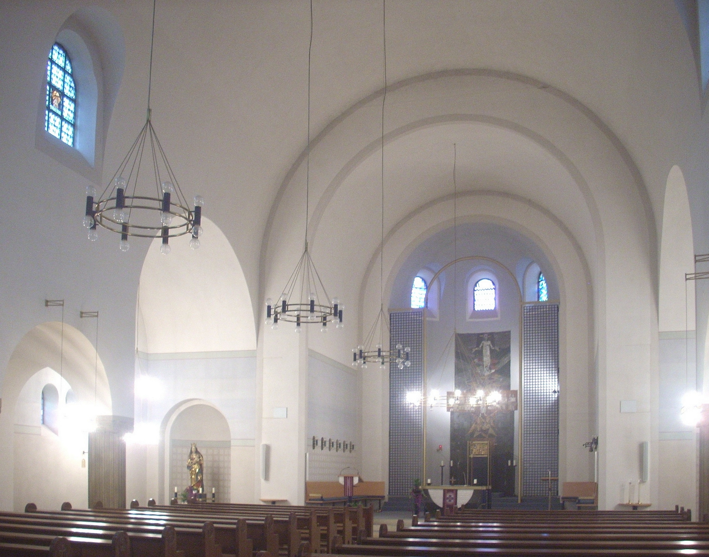 Sarstedt, kath. Pfarrkirche Heilig Geist, Inneres